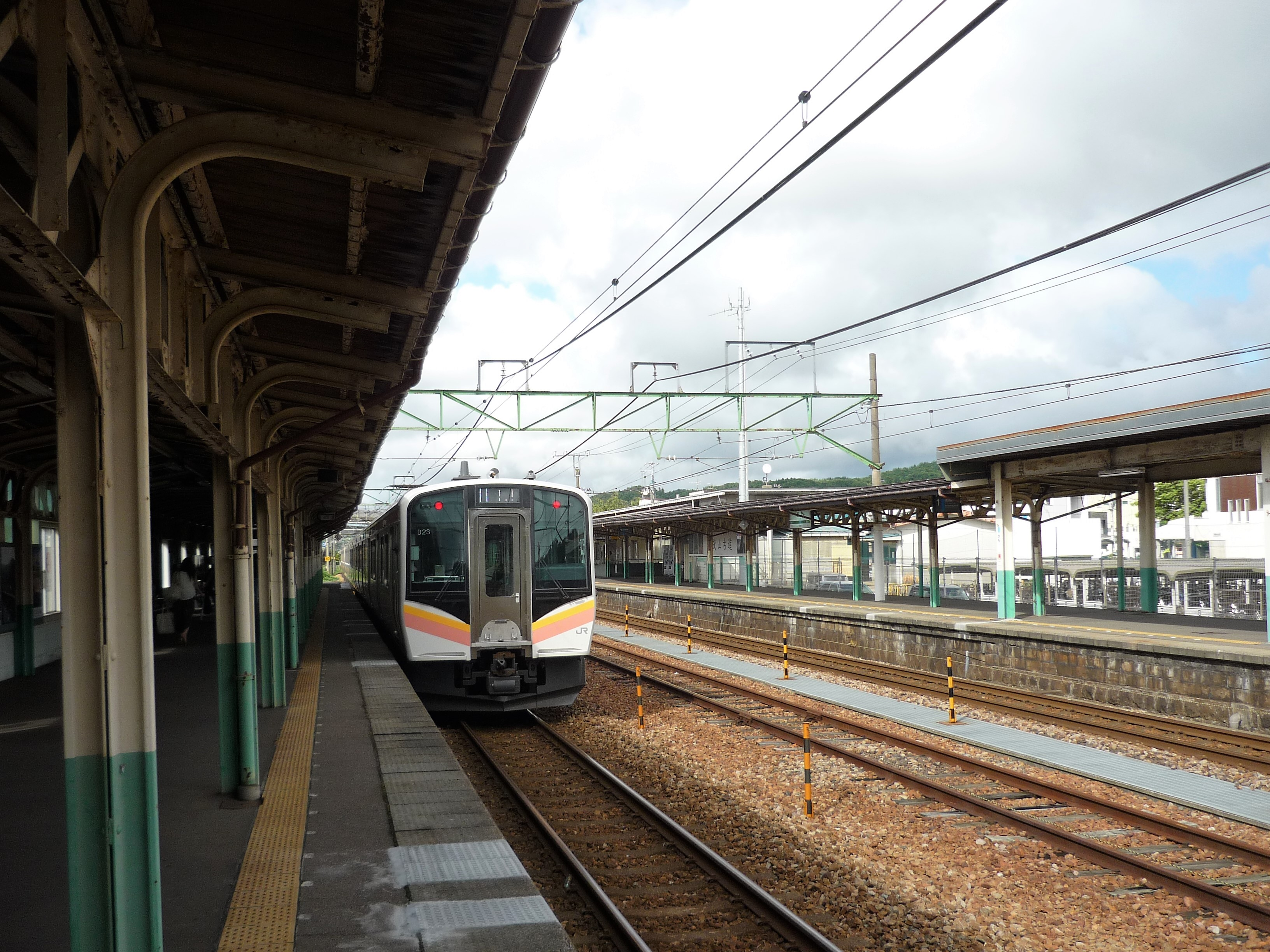 加茂駅2番線を発車する信越本線E129系電車